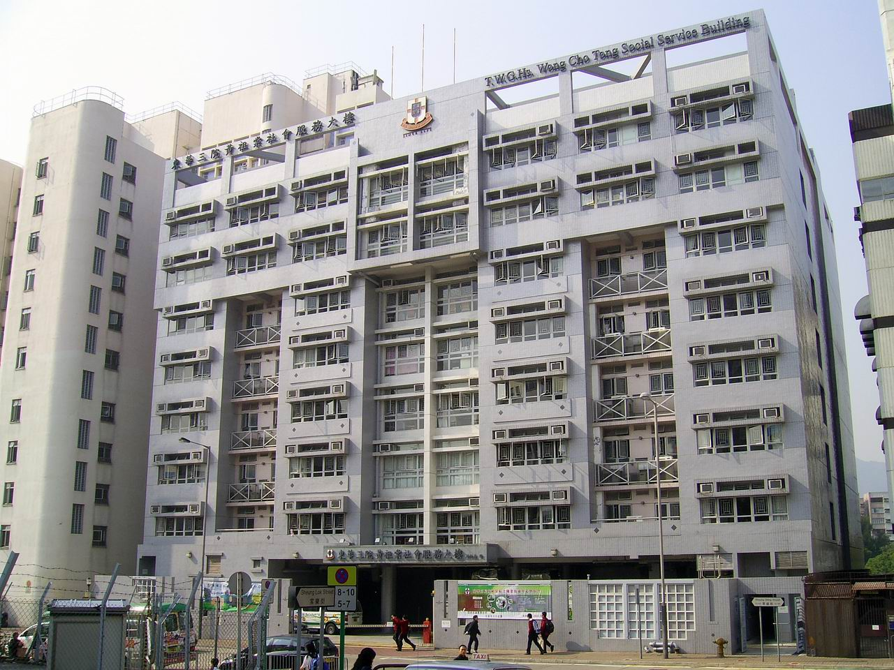 何文田東華三院黃祖棠社會服務大樓